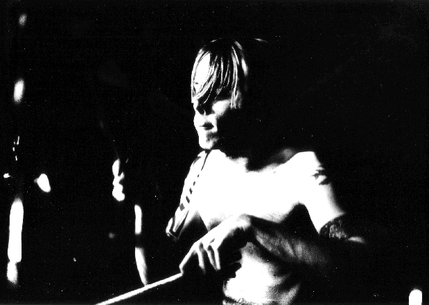 Gruhlke of Rinderwahnsinn live @ Ganderkese